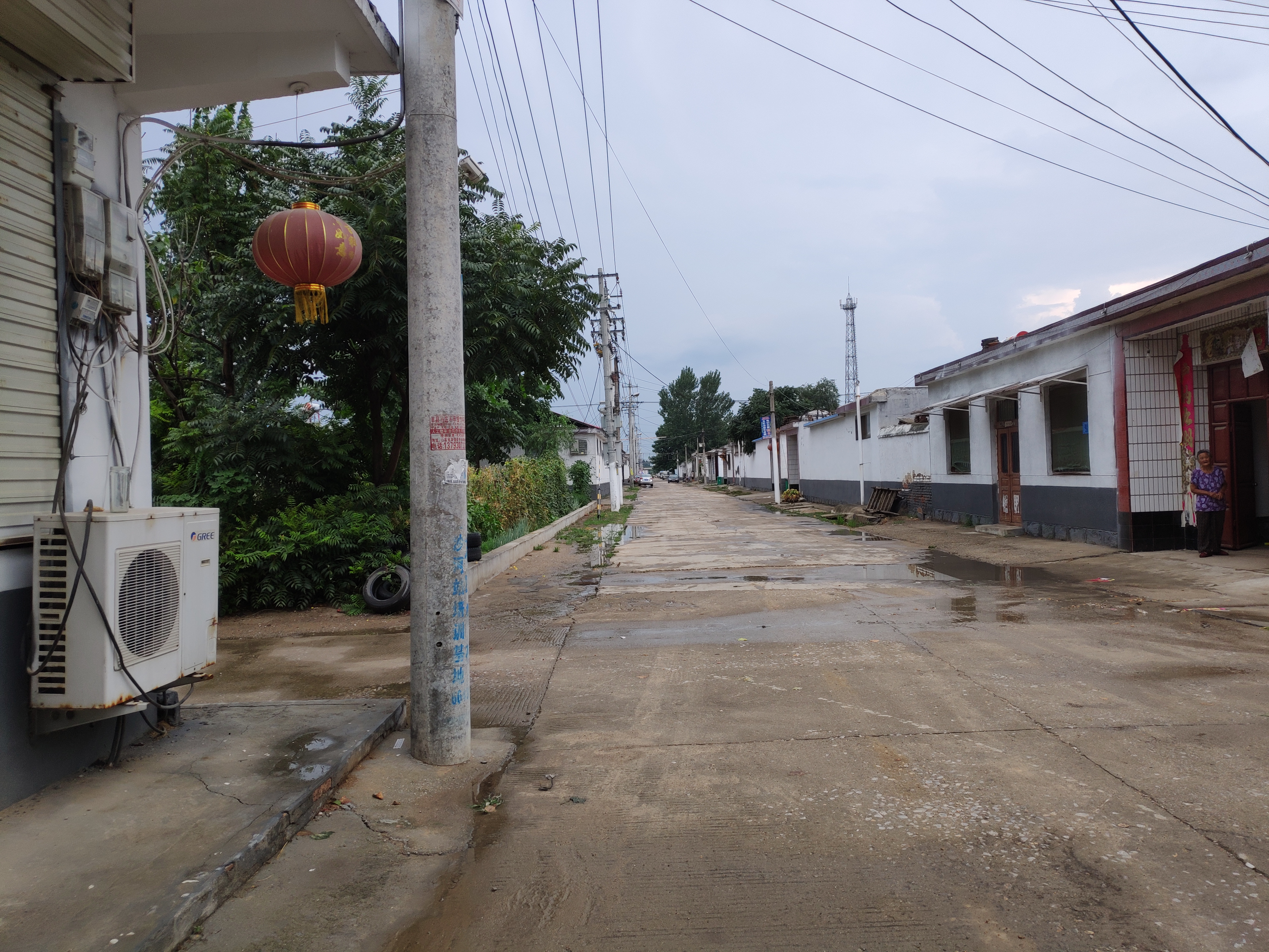 沙河站镇小杨庄